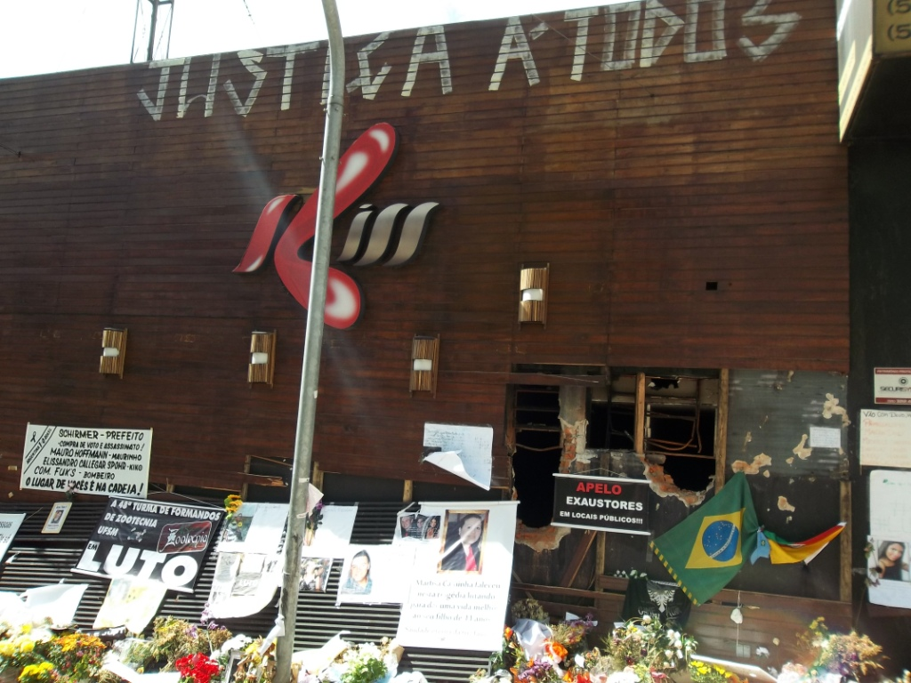 Boate que sofreu incêndio no município de Santa Maria - RS.